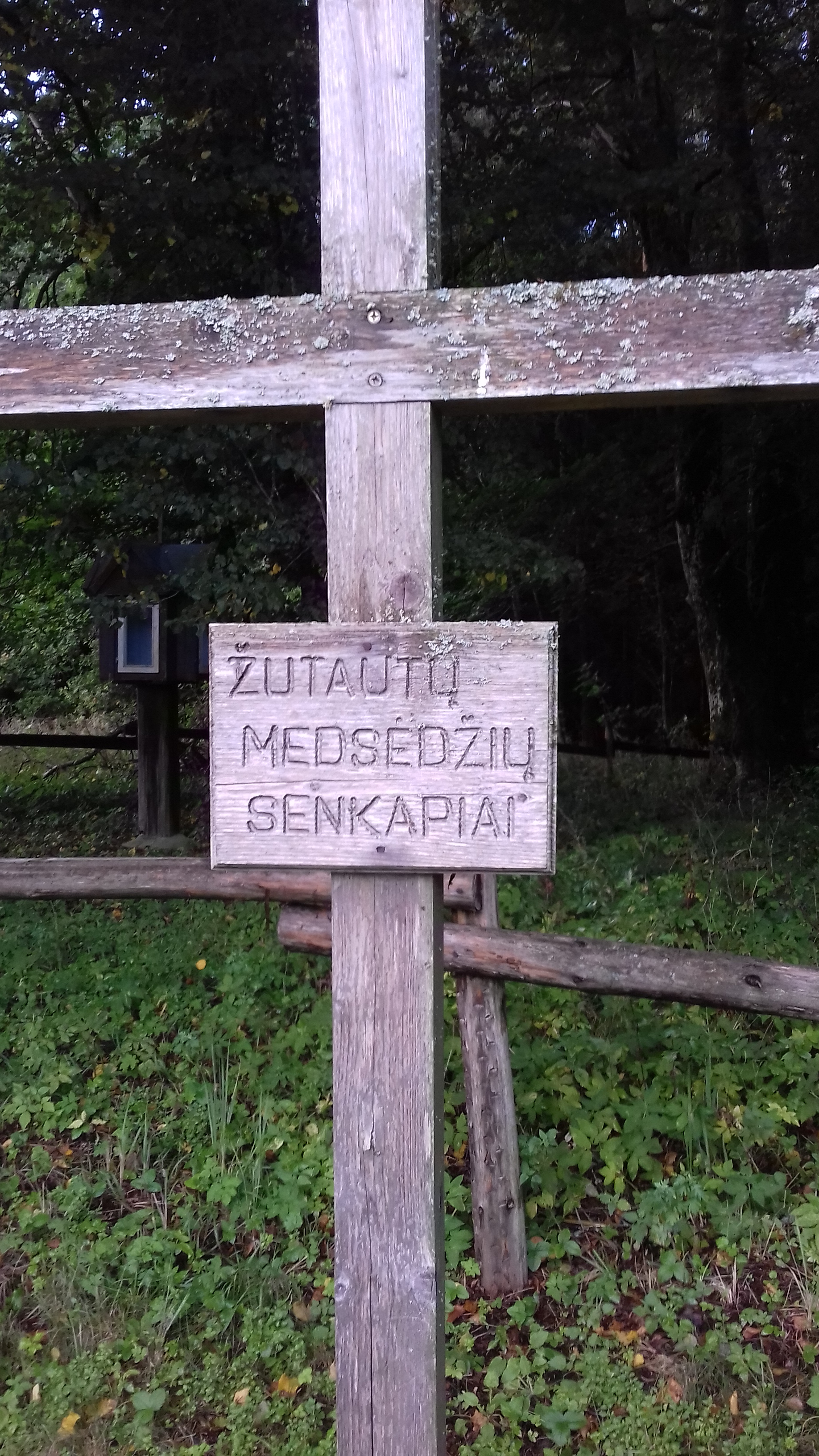 Žutautų - Medsėdžiuų senkapių kryžius